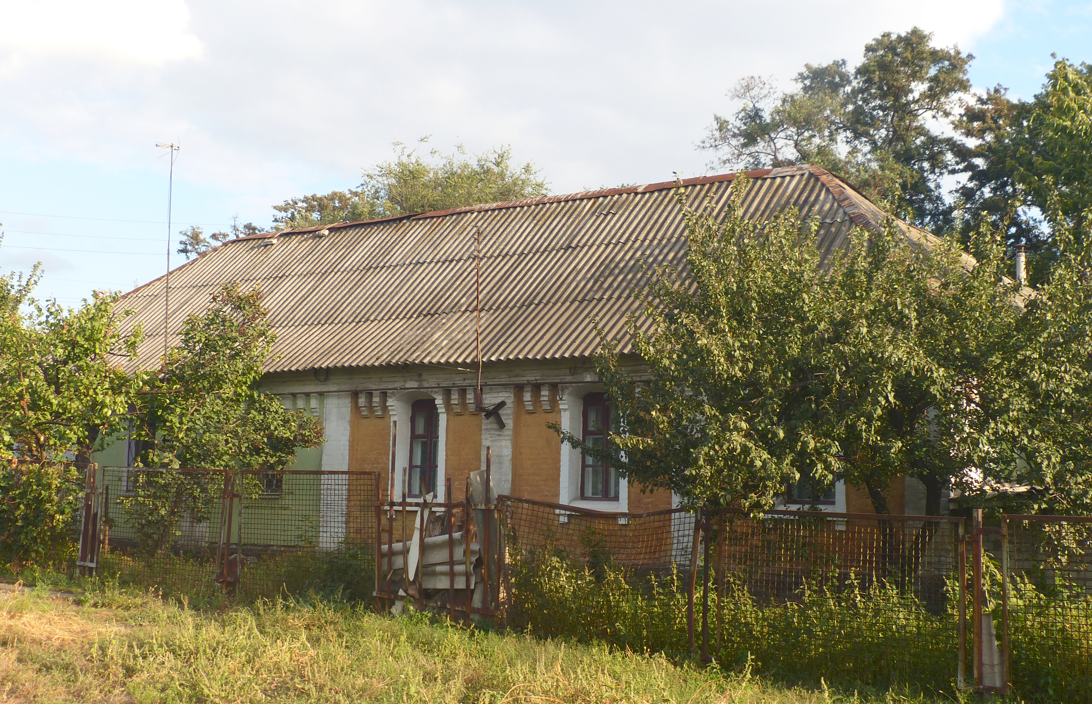 Будинок залізничної лікарні - місце боїв робітників з урядовими військами, Запоріжжя, вул. Барикадна, 18